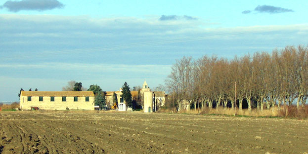 Mas du Juge à Albaron, commune d'Arles - Bouches-du-Rhône, France